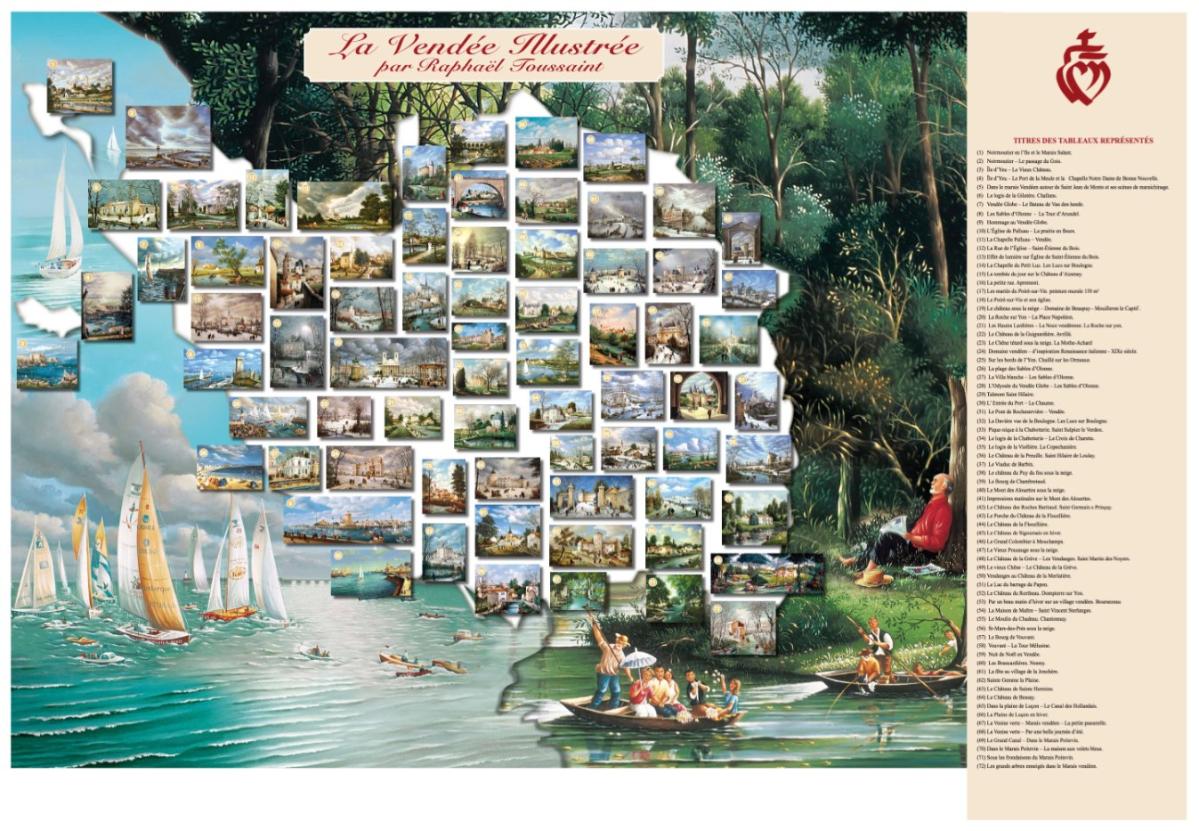 Cette création représente la carte de la Vendée illustrée par soixante-douze tableaux. Elle est réalisée par le peintre français, Raphaël Toussaint. Chaque tableau est positionné sur le site qu'il représente et que l'on peut lire sur la légende. Les dimensions totales de la carte sont: 68x98 cm. Les dimensions de l'image sont: 61,5x78 cm.